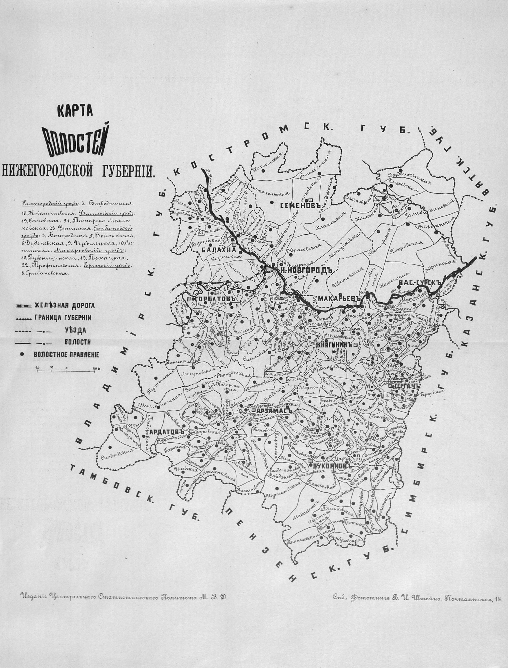 Карта волостей Нижегородской губернии, 1892